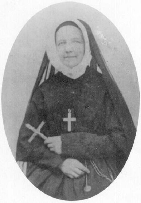 Portrait